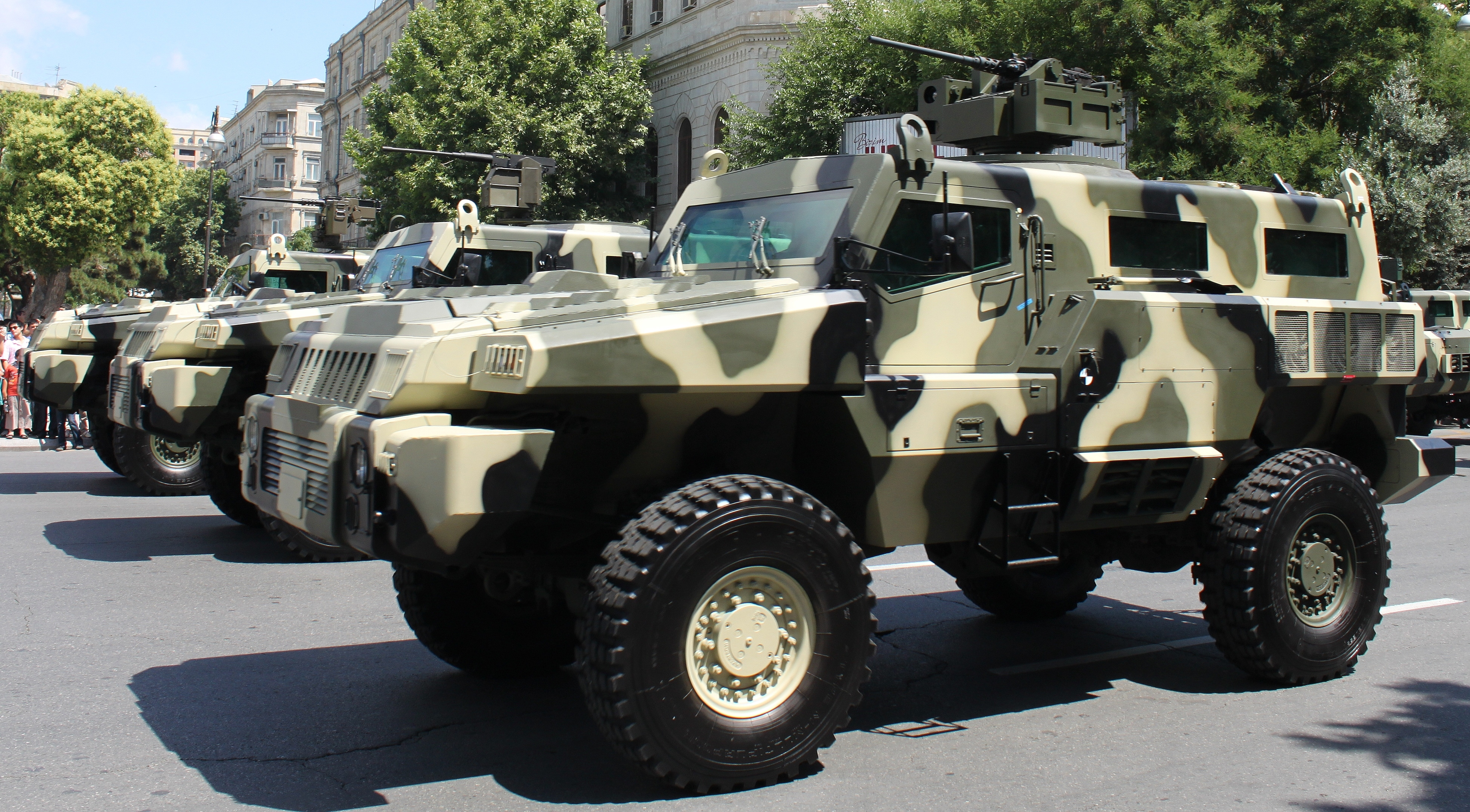 Военный парад в Баку в день вооруженных сил Азербайджана.